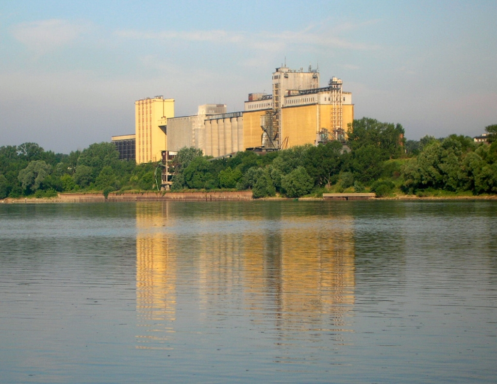 Słodownia Global Malt Polska Sp. z o.o. w Bydgoszczy-Fordonie nad Wisłą